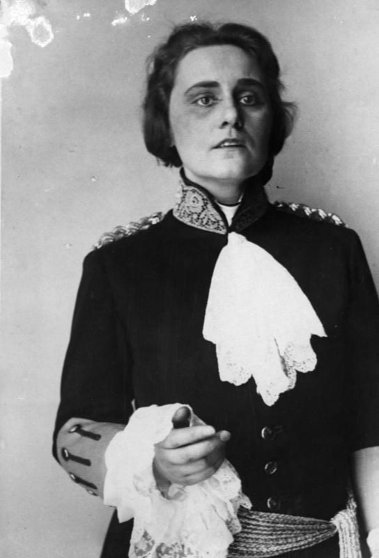 Martha Fuchs Generalprobe Staatsoper "Unter den Linden" - " Der Rosenkavalier" Martha Fuchs ADN-Text: ADN-ZB/Archiv Martha Fuchs, Sängerin (Sopranistin), geb. 1.1.1898 Stuttgart, gest.: 22.9.1974 Stuttgart, war ab 1930 in Dresden engagiert und von 1936-1942 an der Staatsoper Berlin. Marha Fuchs als Ocativian auf der Generalporbe zur Oper "Der Rosenkavalier" von Richard Strauss an der Staatsoper Berlin. Aufn. : um 1937 Abgebildete Personen: Fuchs, Martha: Sopranistin an der Staatsoper Unter den Linden Berlin, Deutschland